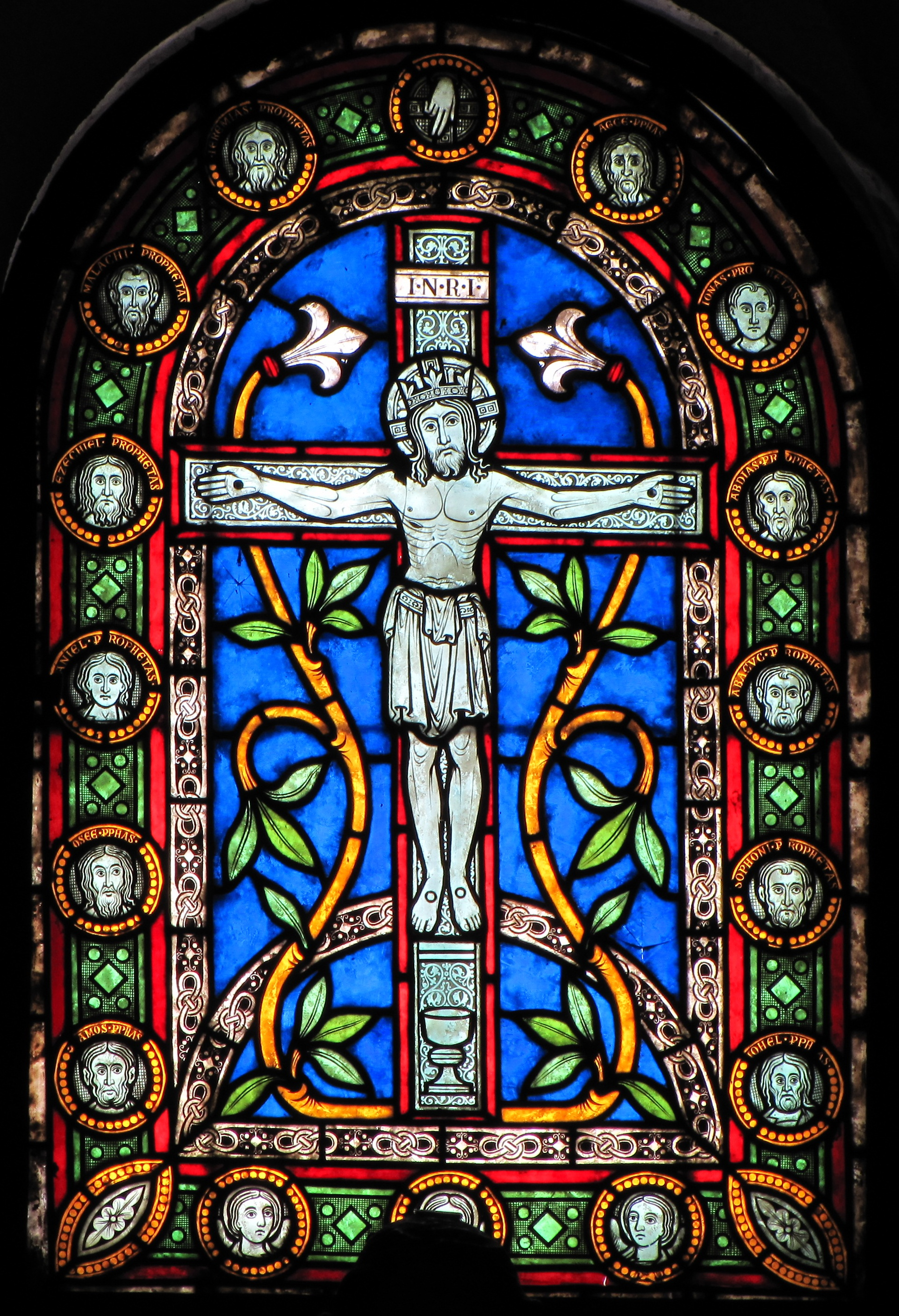 Alsace, Bas-Rhin, Andlau, Église Saints-Pierre-et-Paul dite Sainte-Richarde (PA00084587, IA00115010): Crypte romane. Verrière néo-romane "Crucifixion" (XIXe, Baptiste Petit-Gérard).